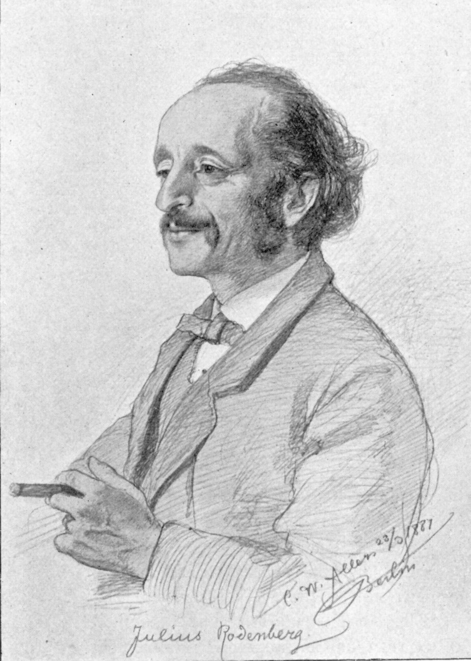 Porträt des Journalisten Julius Rodenberg (1831-1914)